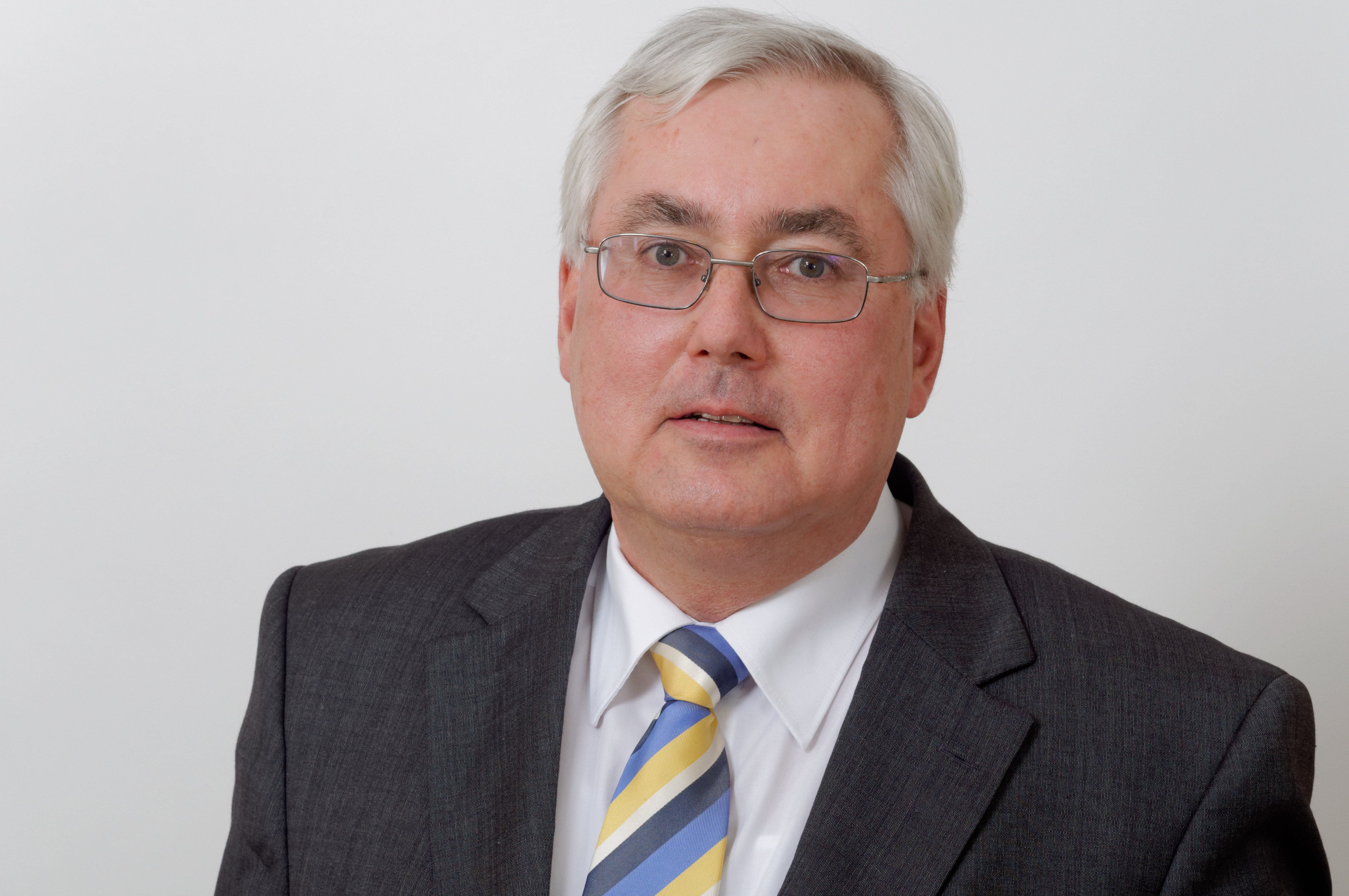 Landtagsprojekt Hessen